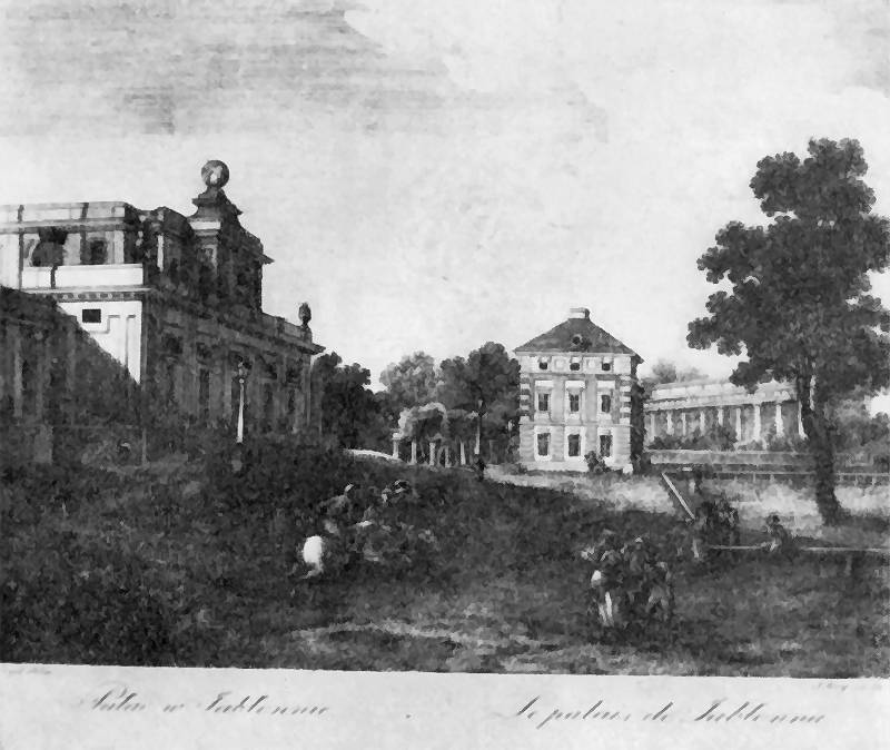 JABŁONNA Pałac w Jabłonnie. 1806. Akwaforta wykonana przez Jana Freya wg rysunku Z. Vogla. 24,9 x 29,8 cm